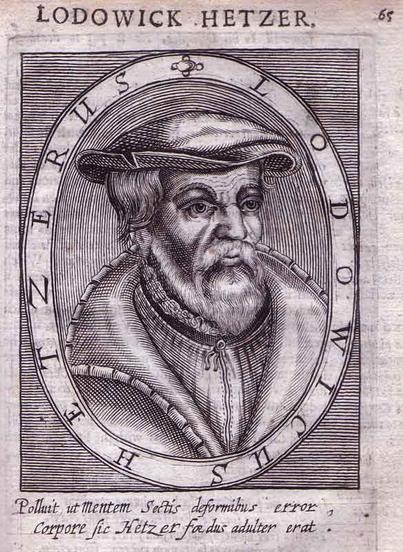 Stich des Täufers Ludwig Hätzer (1500 - 1529)